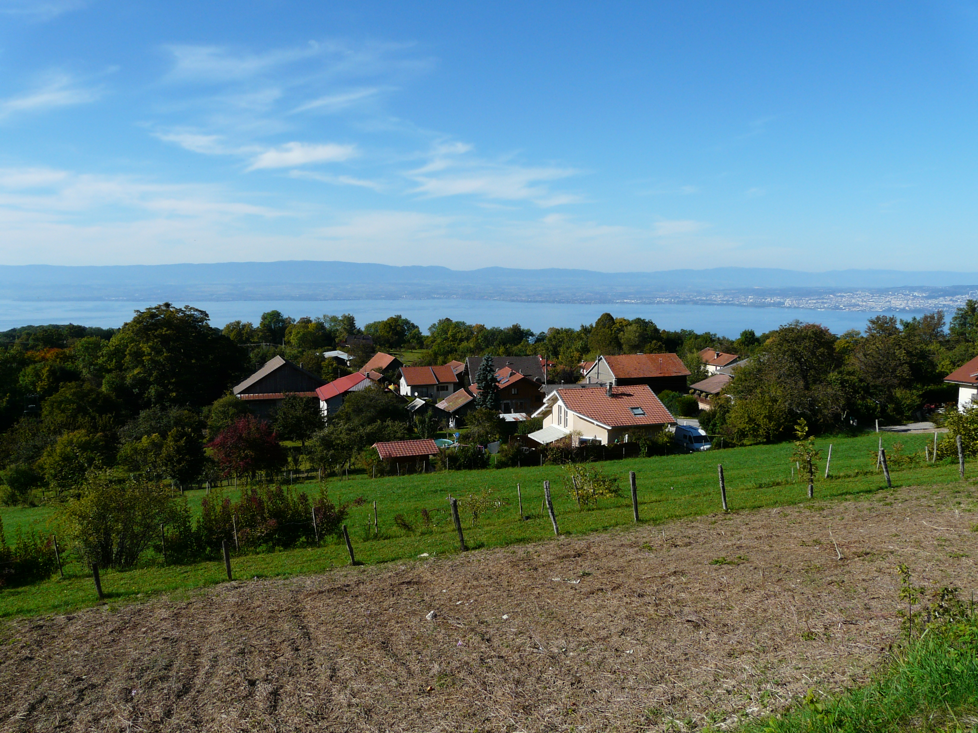 Le hameau de Roseires, commune de Saint-Paul-en-Chablais